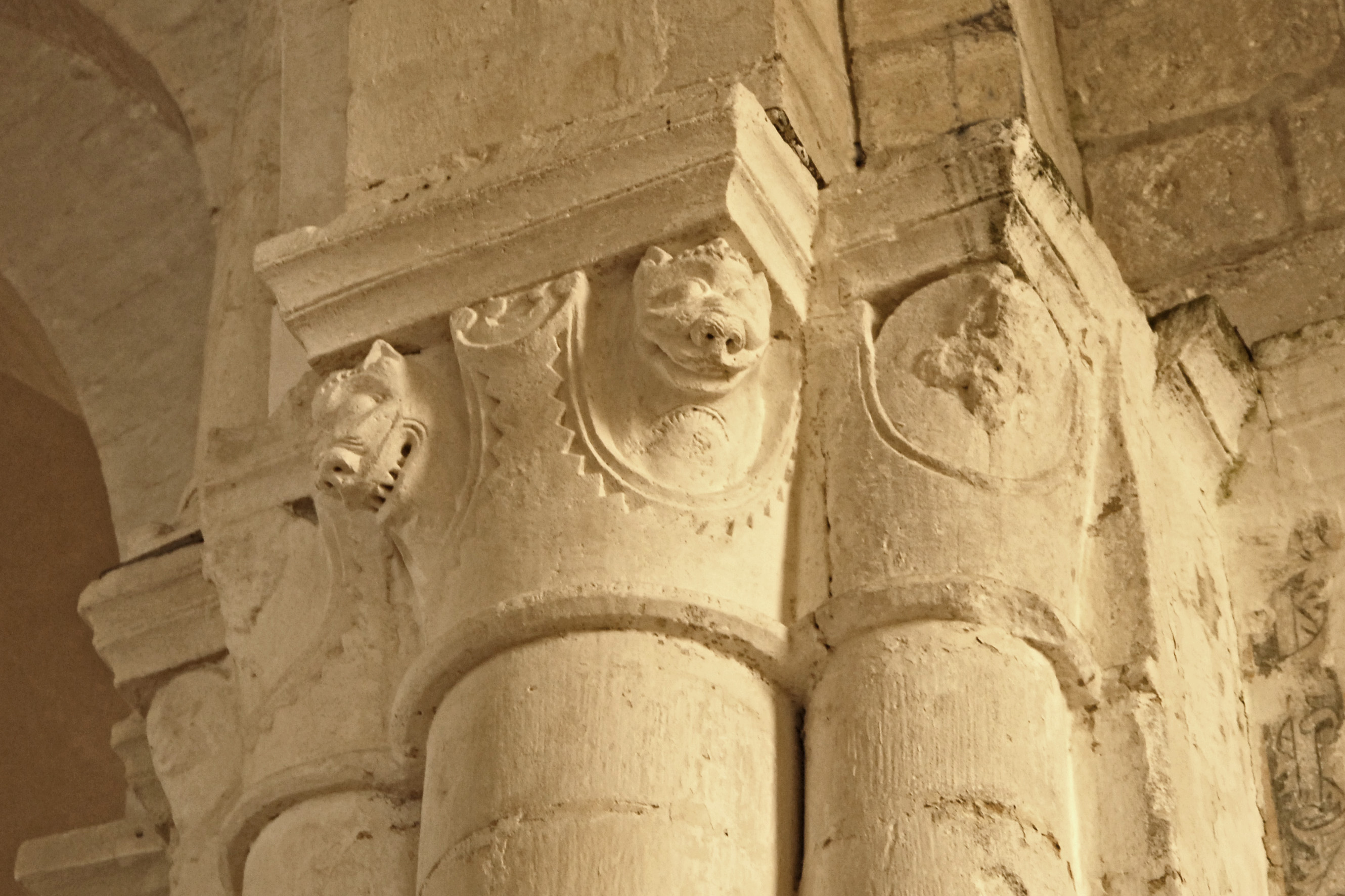 Notre-Dame Corme-Écluse, Vierungskapitelle